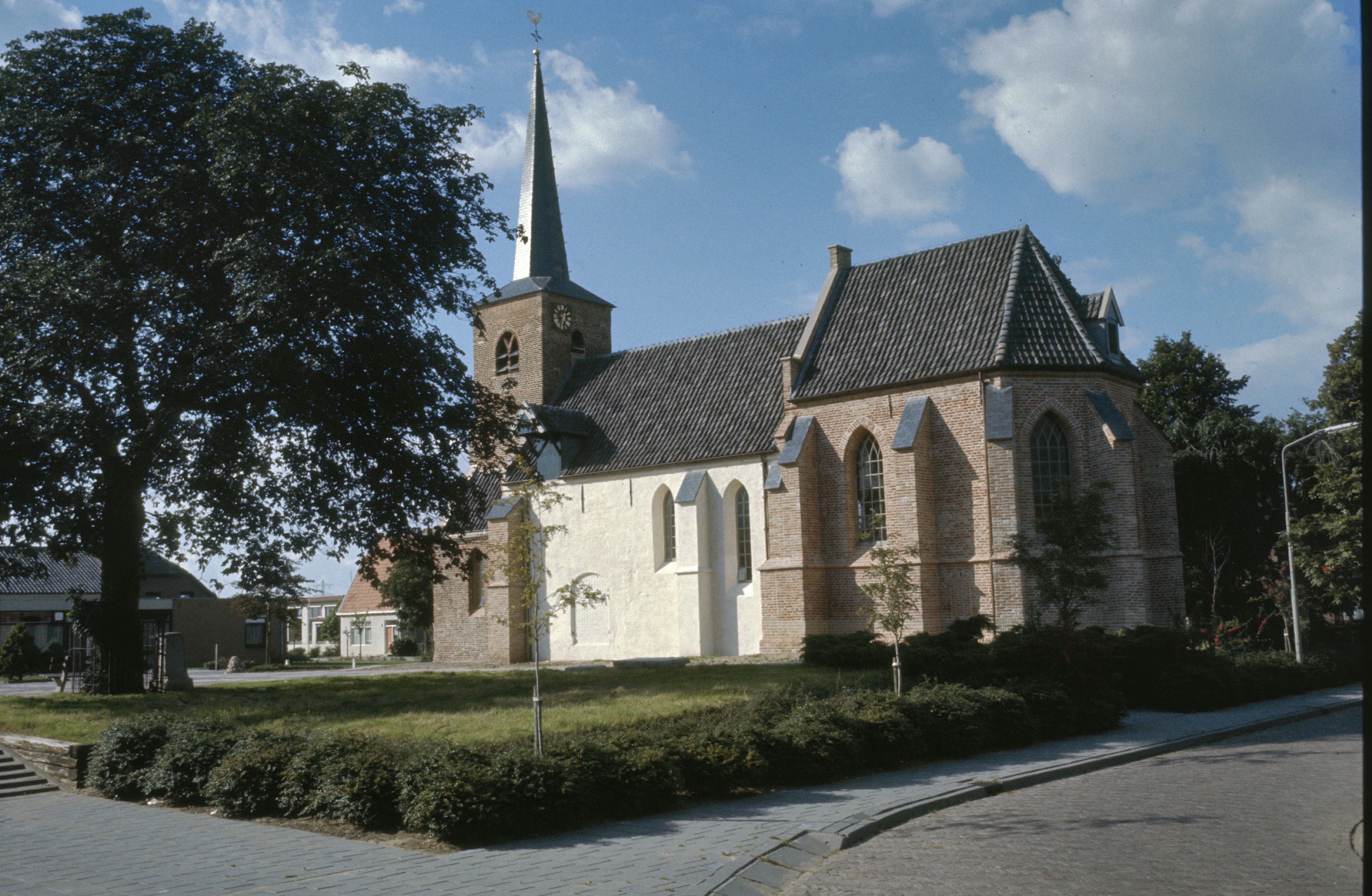 Nederlands Hervormde Kerk: Overzicht zuidgevel met kerktoren